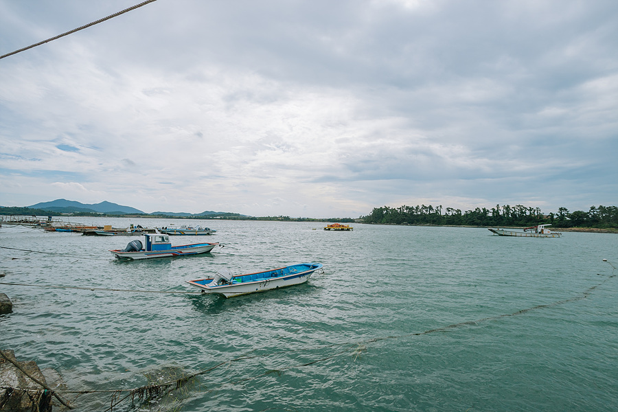 임하도의 선착장 모습